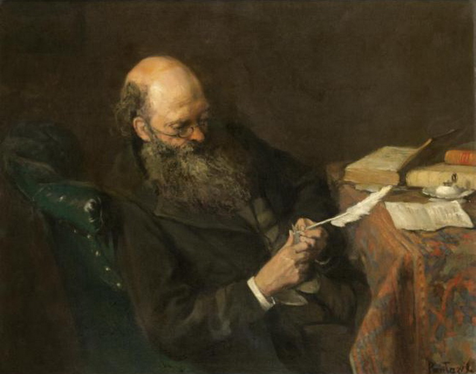 Périclès Pantazis (1849-1884): Author